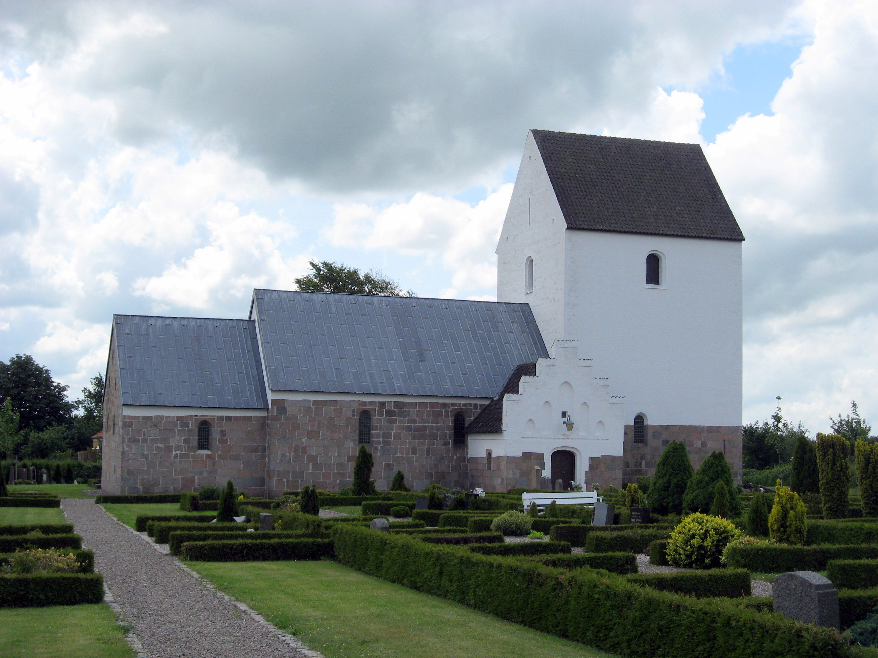 Tolstrup Kirke (Brønderslev Kommune)